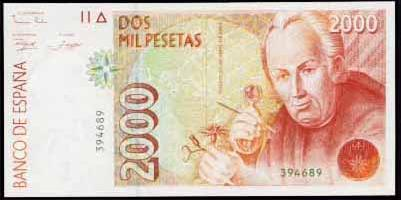 2000 pesetas del 92